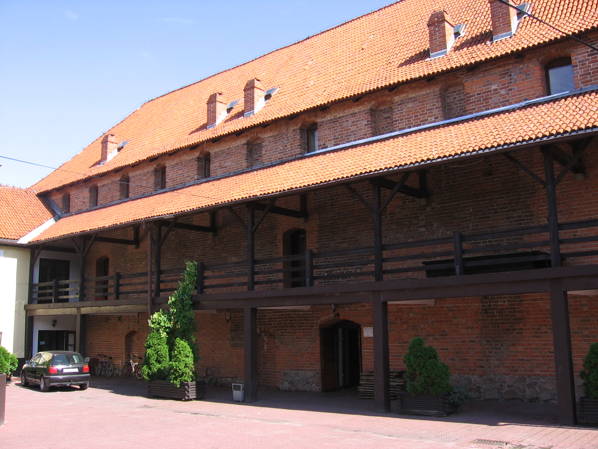 Nowe - zamek krzyżacki, 1350, 1844, 1980-1990